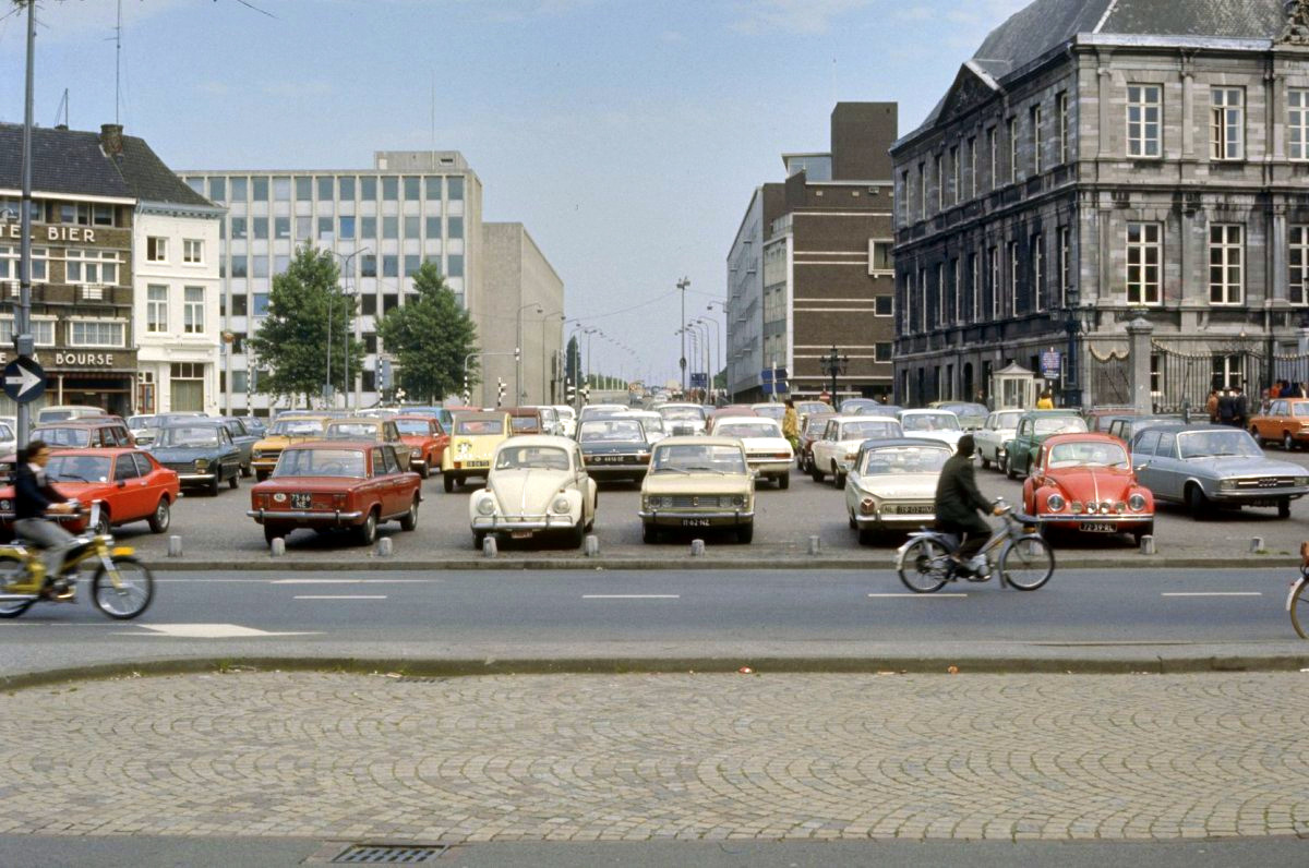 Zicht op de Markt ca. 1970 met rechts het stadhuis en in het midden de niet meer bestaande Stadhuisstraat met de gesloopte stadskantoren.